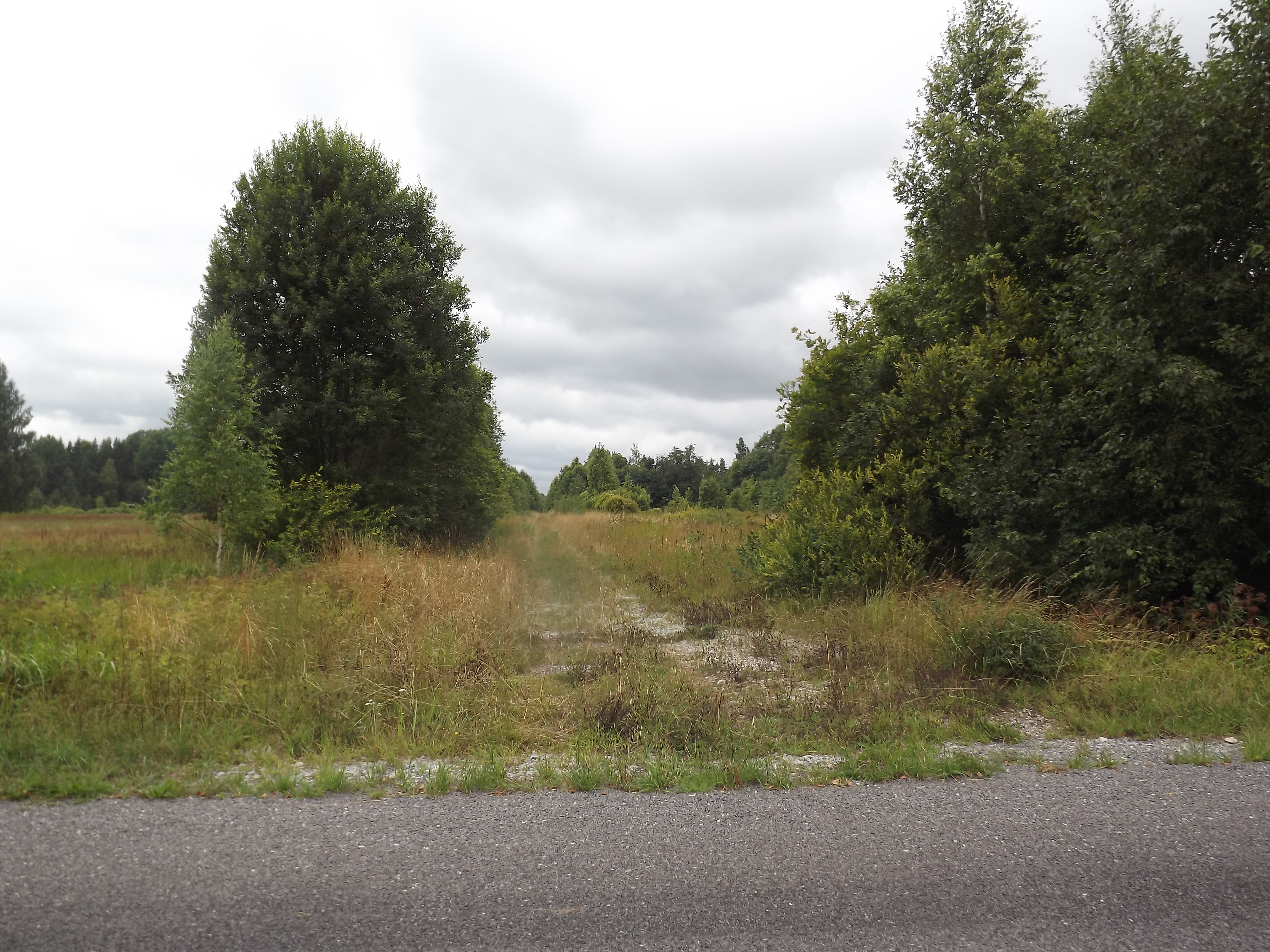 Endise Tihemetsa raudteepeatuse asukoht